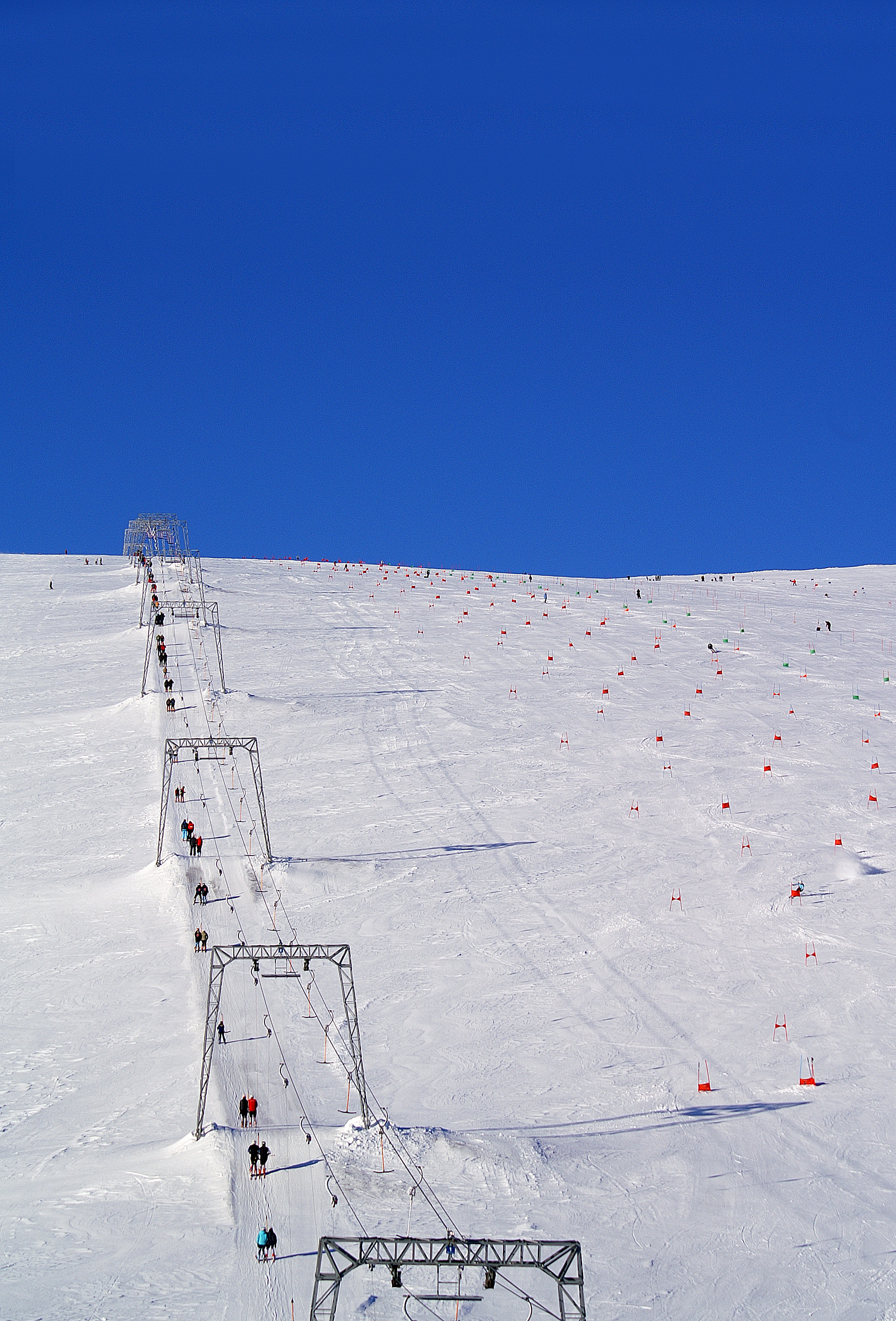 Galdhøpiggen Summer Ski Centre in Norway